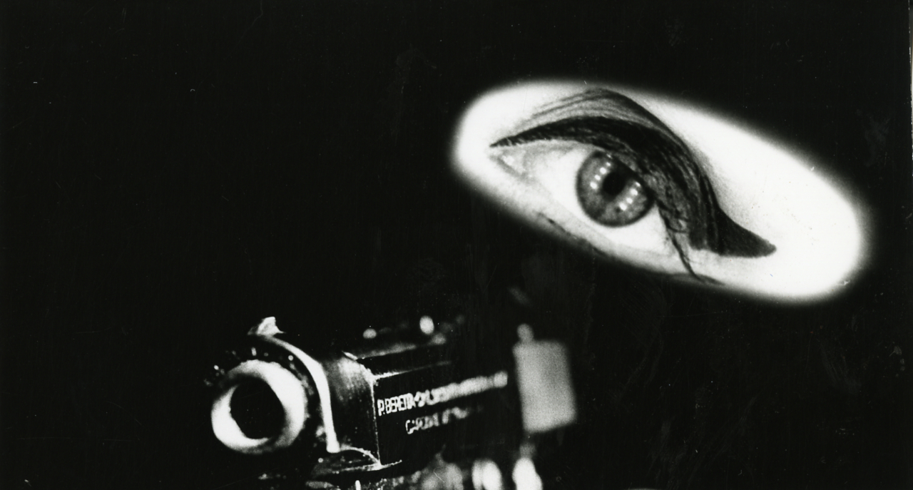 Pubblicità pistola Beretta? Servizio fotografico : Italia, 1975 / Paolo Monti. - Stampe: 3 : Positivo b/n, gelatina bromuro d'argento/ carta, 18x24. - ((Sul coperchio della scatola iscrizione didascalica manoscritta a pennarello nero: "Ritratti/ bambini - Monti/ Part. corpo".